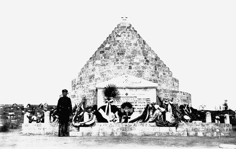 фото Галлиполийского памятника